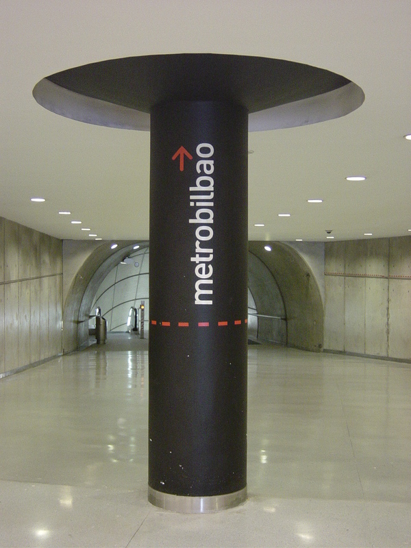 San Mames geltokia / Estación de San Mamés